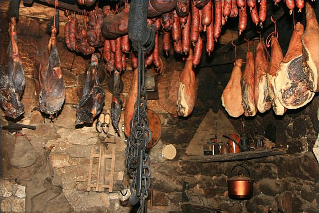 Hecha el Sabado 24 Enero 09, día de Temporal y nieve, en una "Palloza" de O PIORNEDO - ANCARES - LUGO "Sin luz de ningún tipo" y no sabía a donde enfocaba ... jajajaj Los productos son: "Cecina de Potro", "Cecina de ternera", "Androia", "Botelos", "Chourizos de Cocer", "Paletillas", "Jamones" O Piornedo, Donís, Cervantes